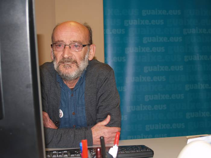 Bixente Serrano Izkori on-line elkarrizketa